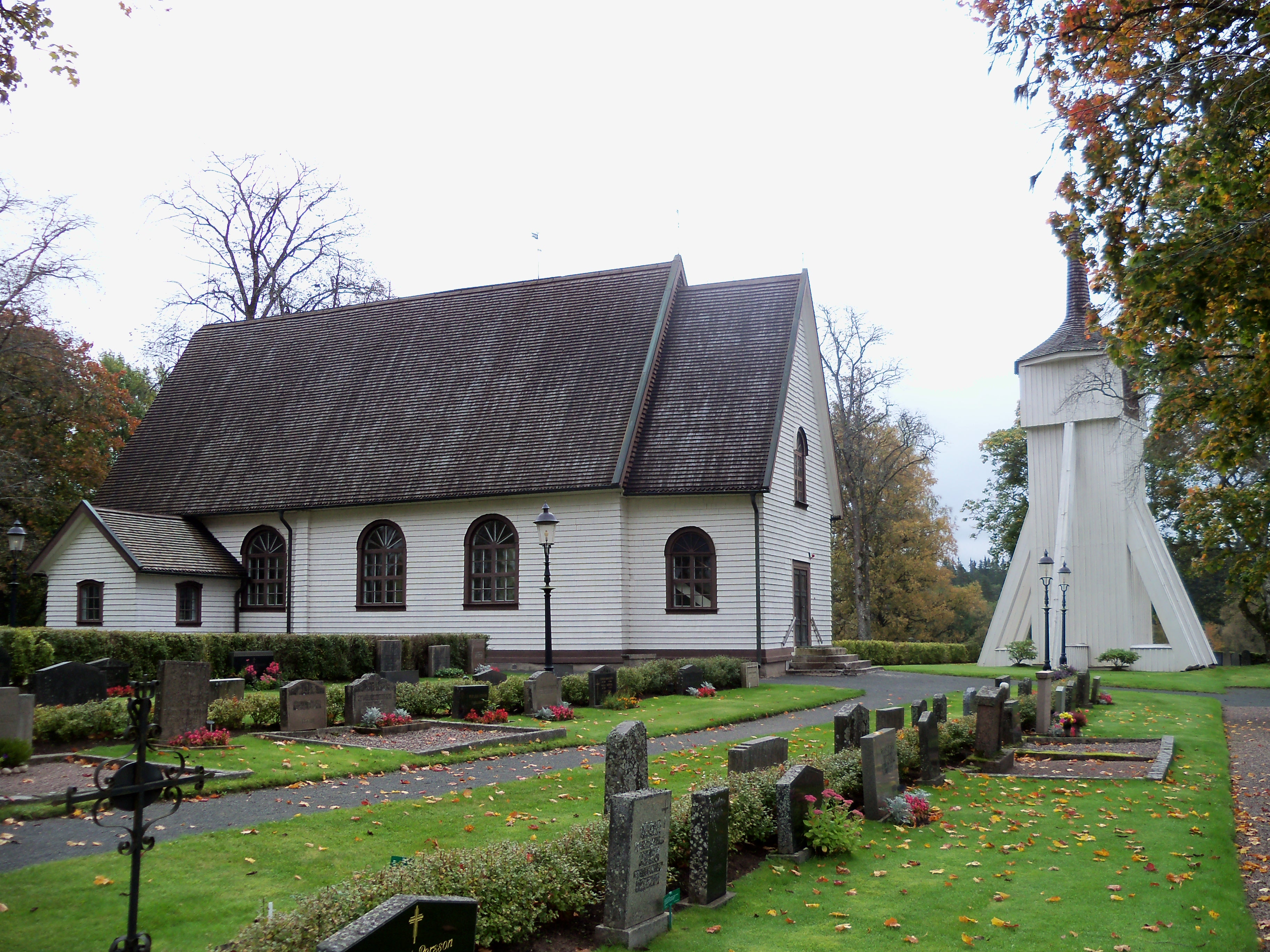 Angerdshestra kyrka